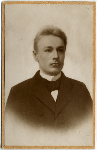 Photo de Jānis Akuraters fait en 1894 par un inconnu. Portrait 14,2x9 cm.